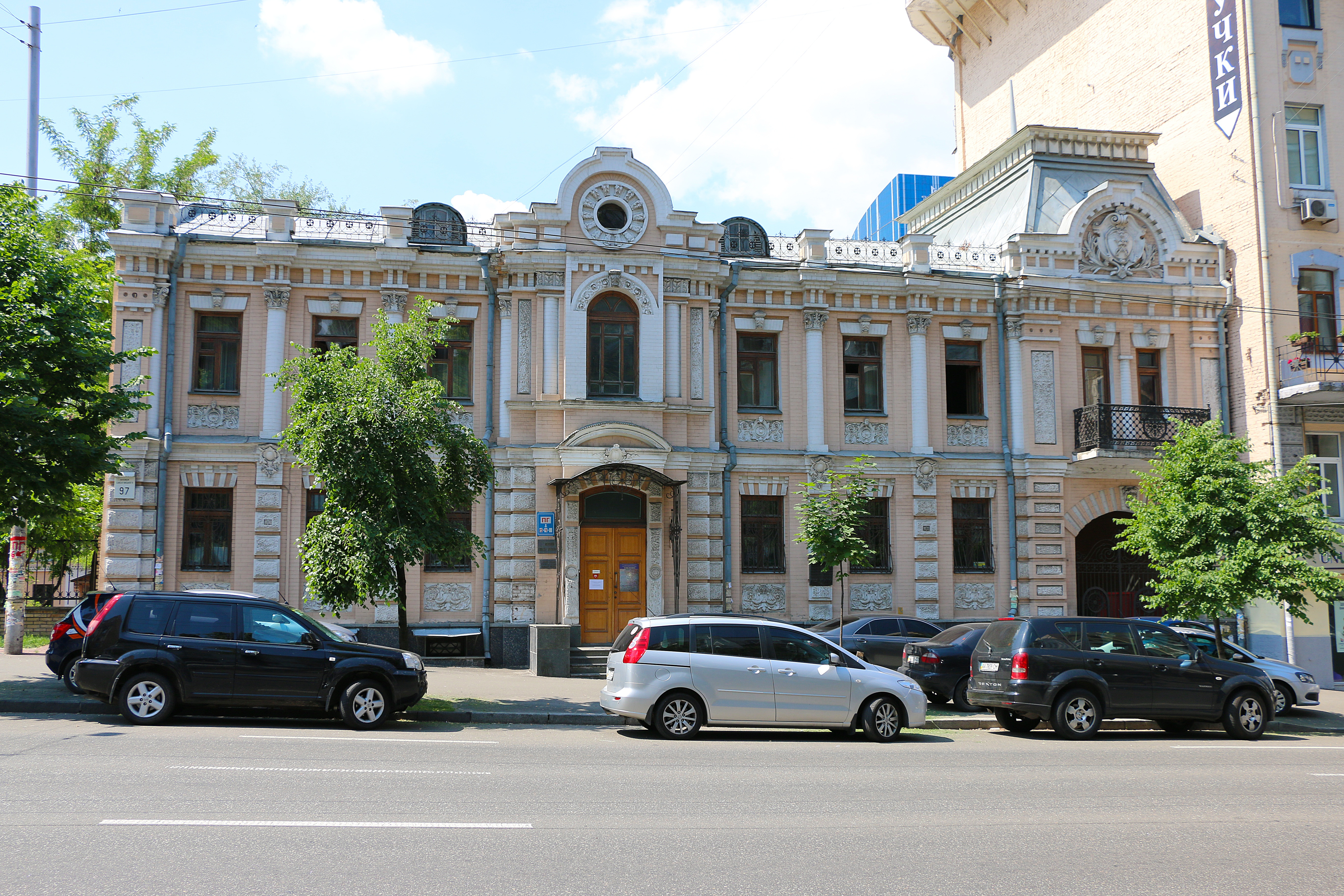 Будинок, в якому у 1899–1908 роках мешкала Леся Українка, поетеса (музей видатних діячів України), Київ, Саксаганського вул., 97